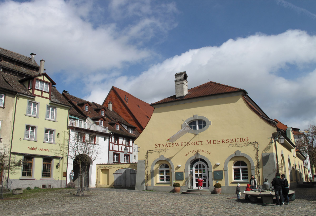 Zona alta de la ciudad alemana de Meersburg, en el lago Constanza